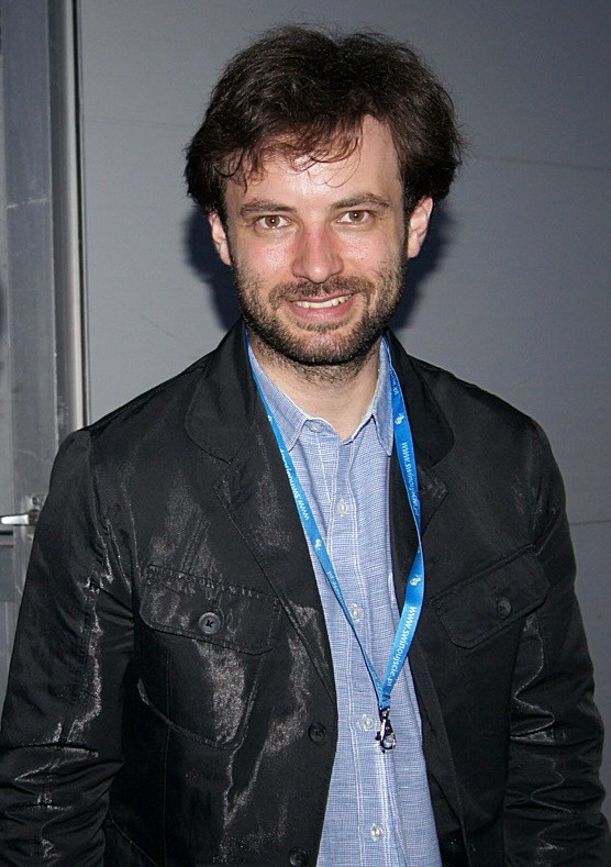 Łukasz Borowicz, polski dyrygent.